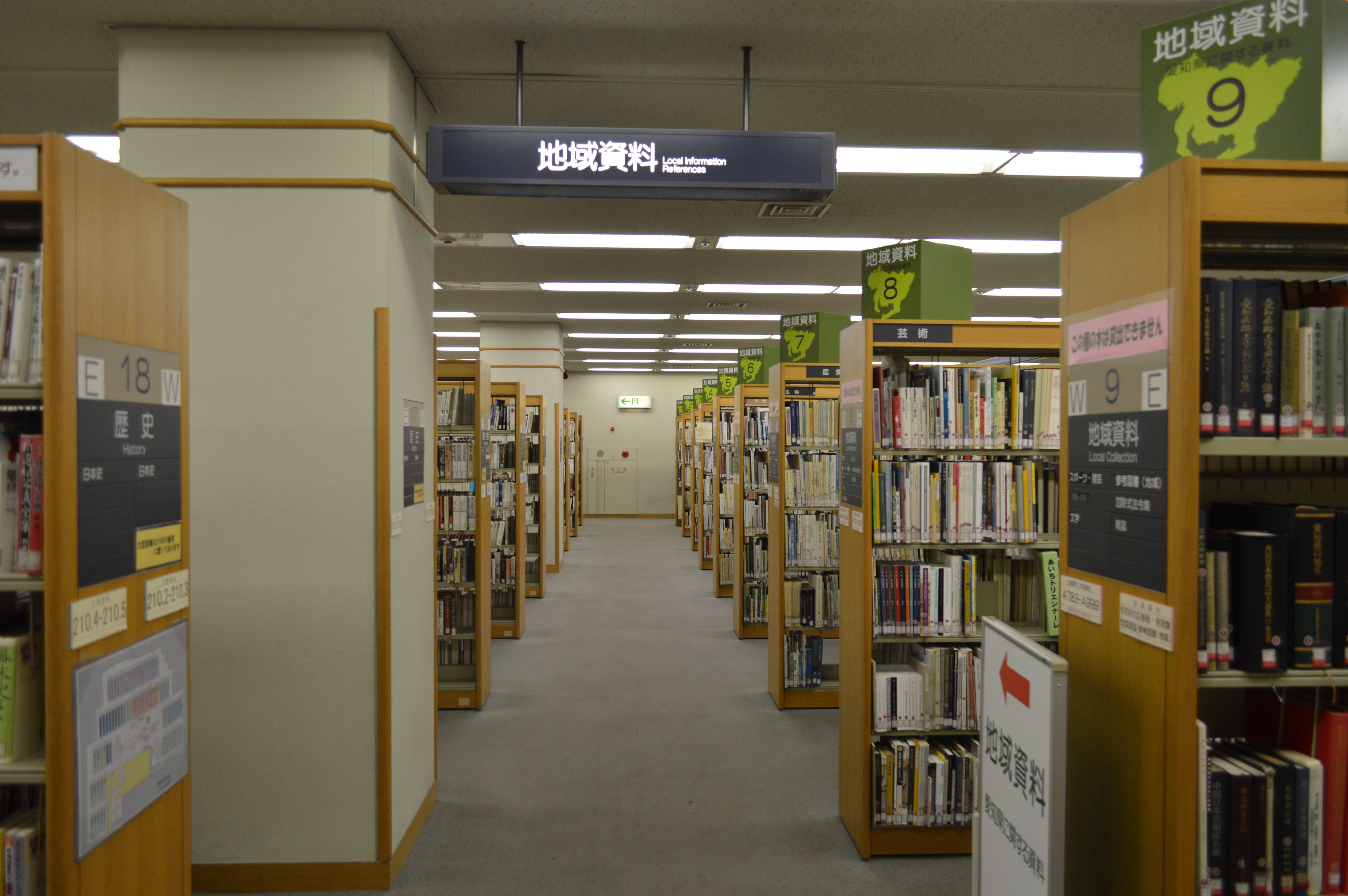 愛知県図書館3階。地域資料コーナー。